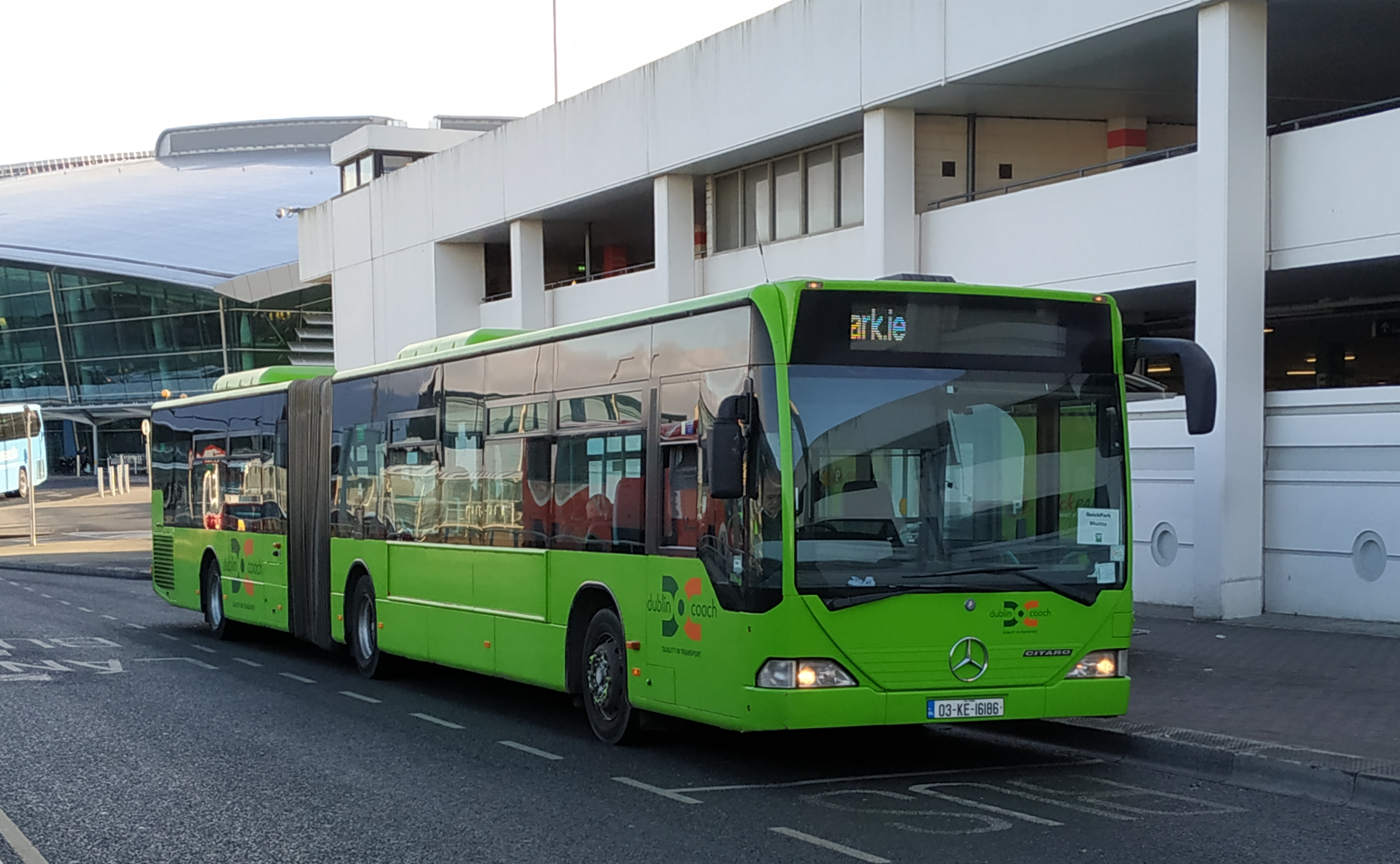 Autobus Mercedes-Benz Citaro G pour le transport des passagers entre les parkings et aérogares de l'aéroport de Dublin